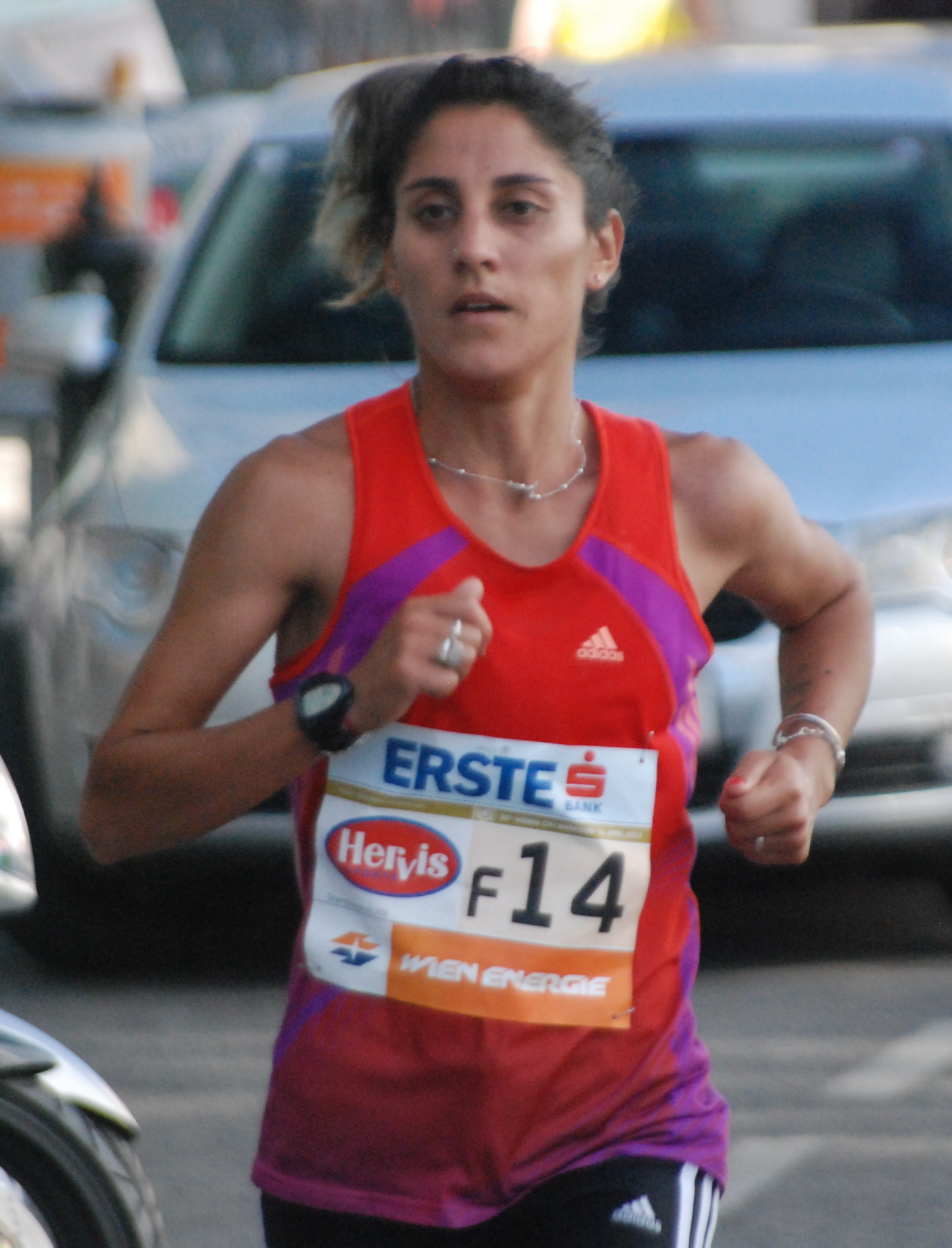 Rosa Godoy beim Vienna City Marathon 2013 auf der Mariahilfer Straße im 15. Wiener Gemeindebezirk